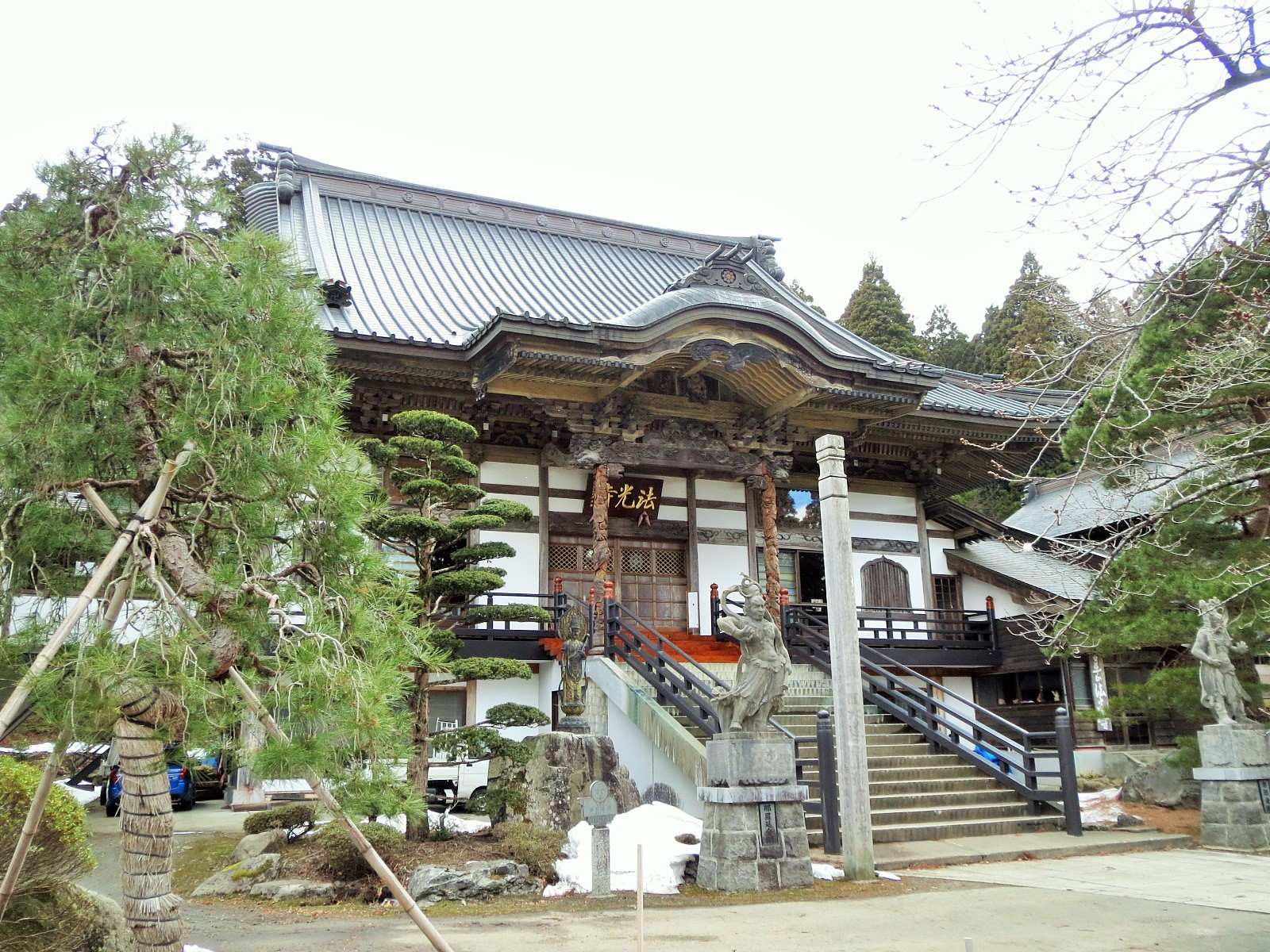 青森県の法光寺本堂 Canon IXY 3